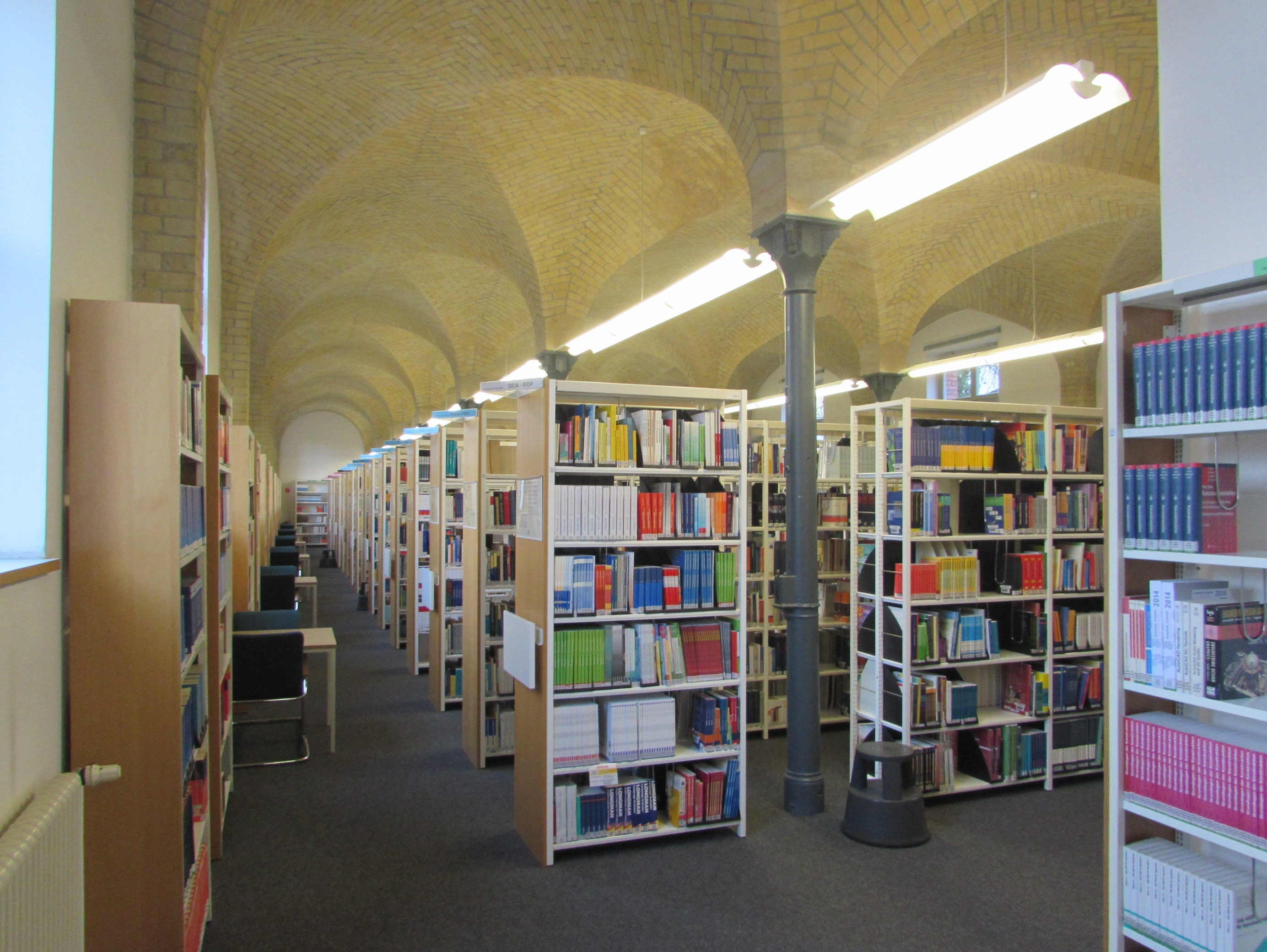 bibliothek der fh brandenburg innen